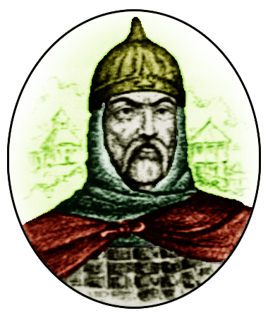 Іоанн Торчин - Засновник смт.Торчин